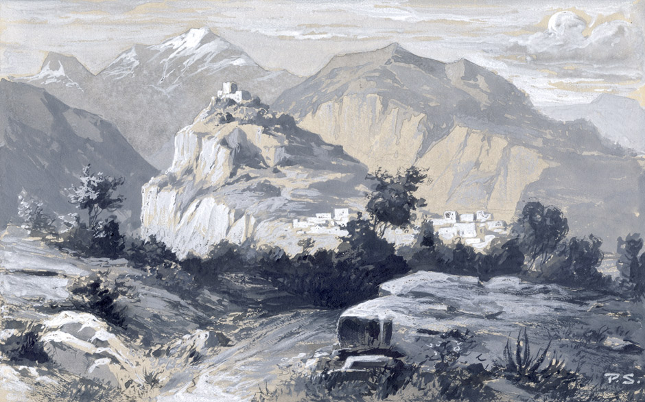 Vorlage zu einer Illustration zu Karl May: In den Schluchten des Balkan, illustrierte Ausgabe 1908, Seite 433 "Das ist Ostromdscha." Gouache in Grau- und Schwarztönen, mit etwas Deckweiß gehöht. Monogrammiert: "P.S.". 14,5 x 22,8 cm. Verso mit handschriftlicher Bezeichnung in Bleistift